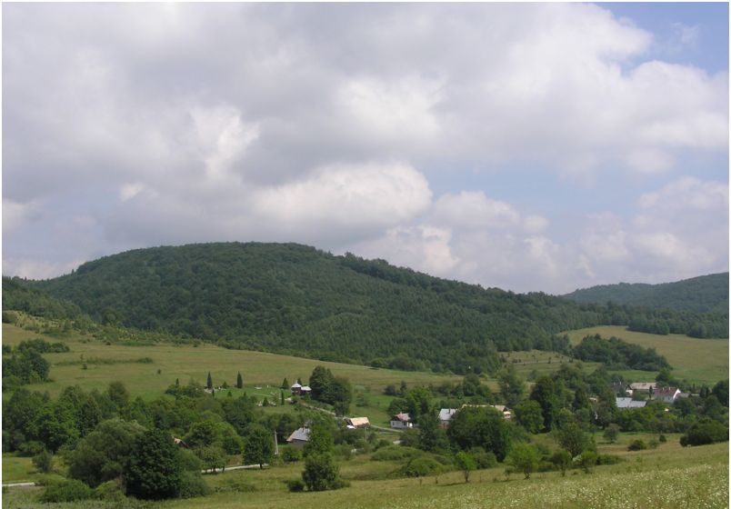 Celkový pohľad